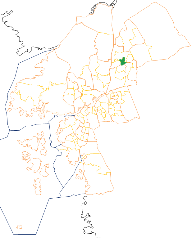 Karta som visar primärområdes belägenhet i Göteborg